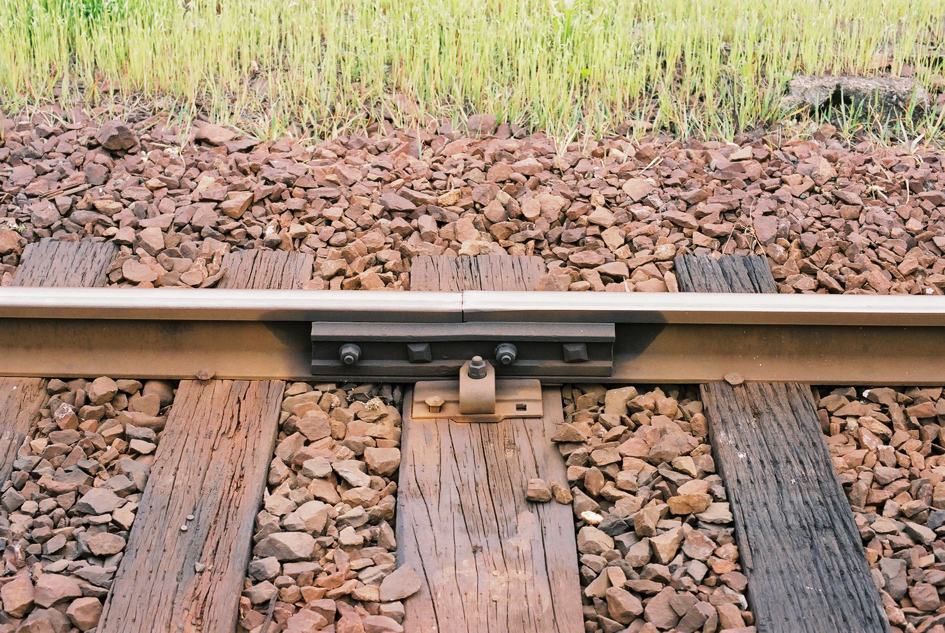 段違い継目板、北近畿タンゴ鉄道宮津線岩滝口駅構内